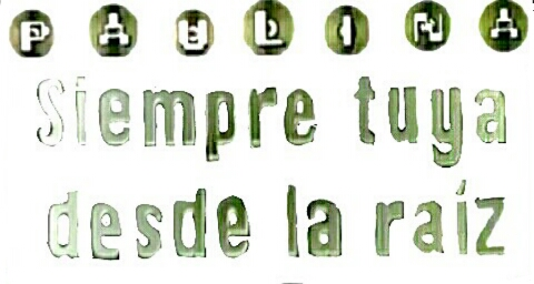 Logo de el sencillo Siempre Tuya Desde La Raíz lanzado en 1996 por Paulina Rubio y Emi